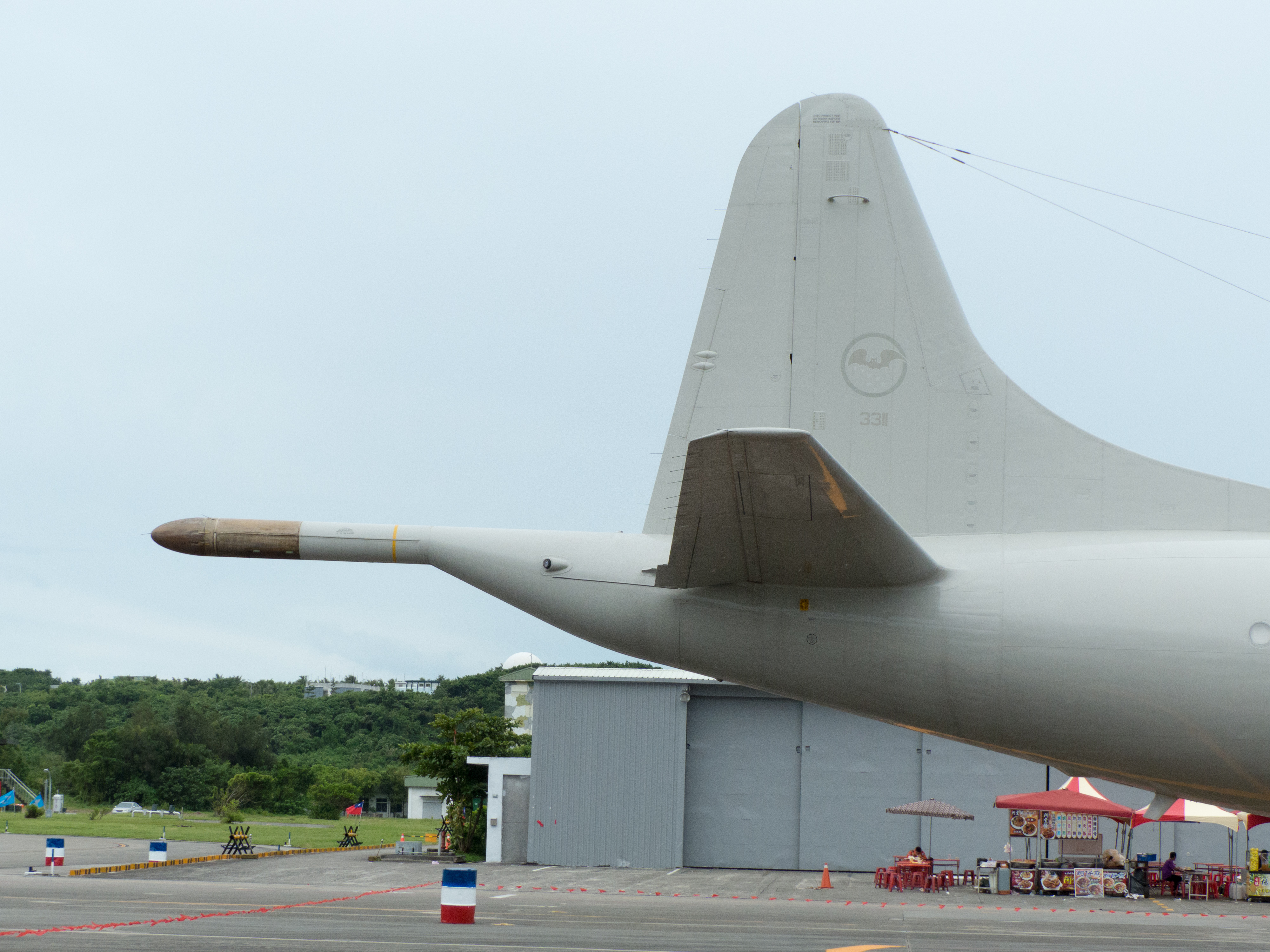 2016空軍花蓮基地營區開放活動下午，停機坪上靜態展示439混合聯隊反潛機大隊34中隊P-3C 3311反潛哨戒機的機尾。